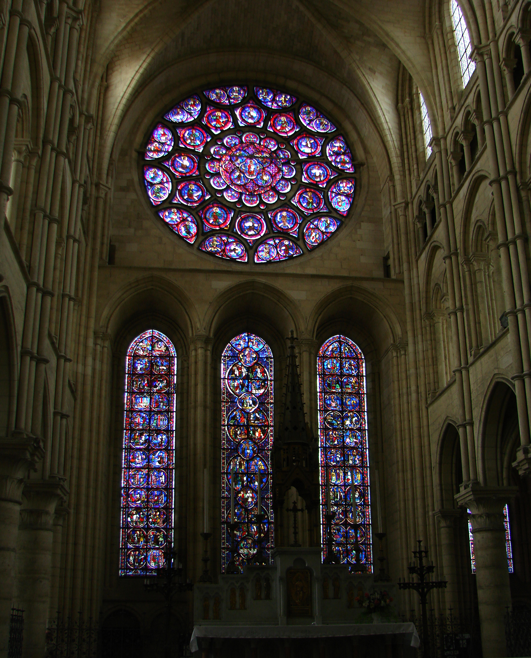 Le choeur de la cathédrale de Laon, avec la rose orientale et les trois lancettes.